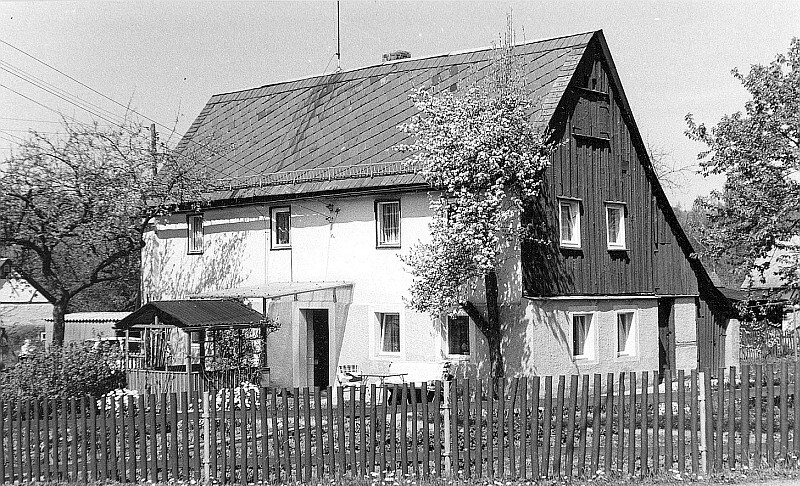 Original image description from the Deutsche FotothekTriebischtal-Munzig. Bergbau, ehem. Silberwäsche bzw. Pochwerk